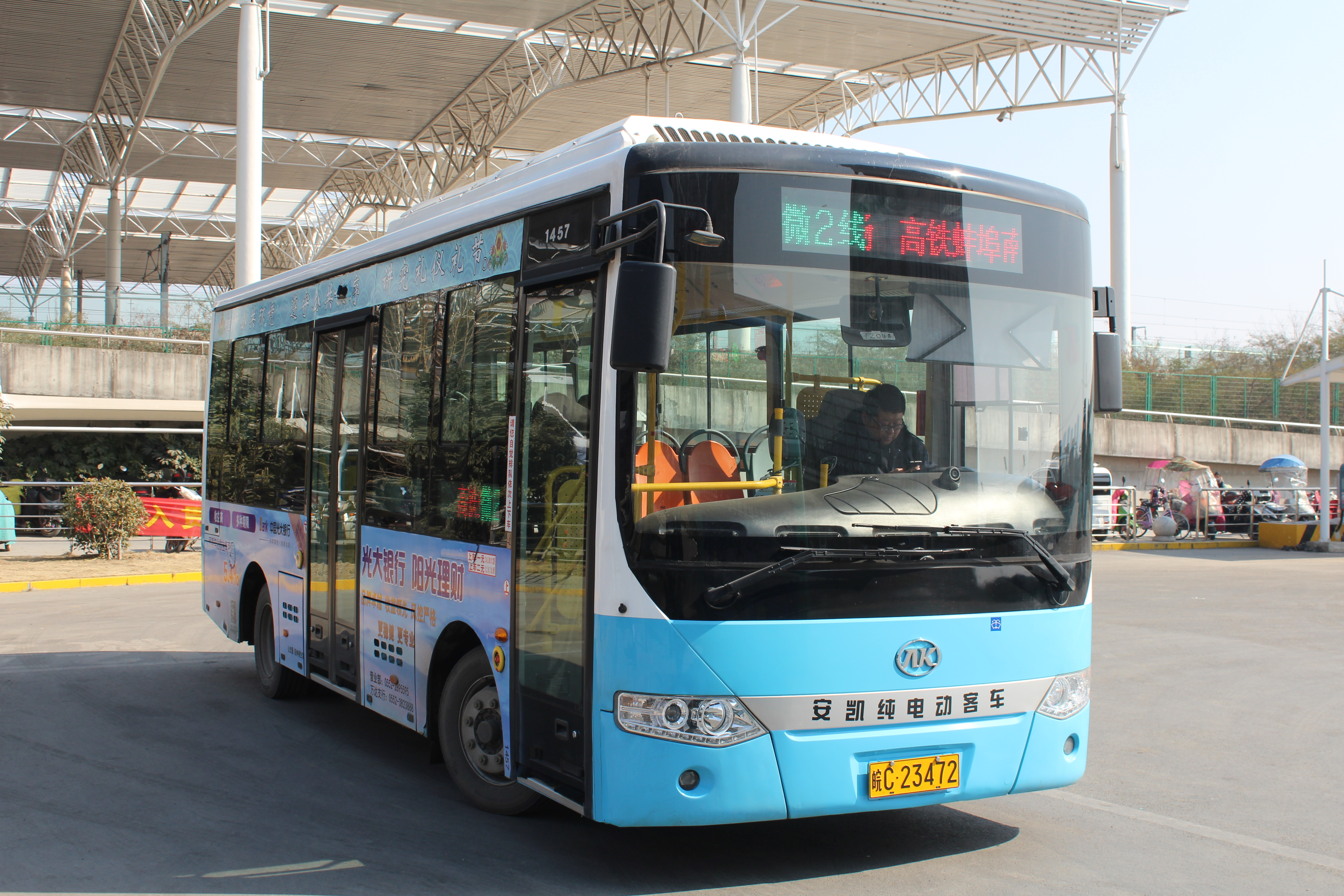 中文（中国大陆）: Bengbu Bus No.Micro 2 Line